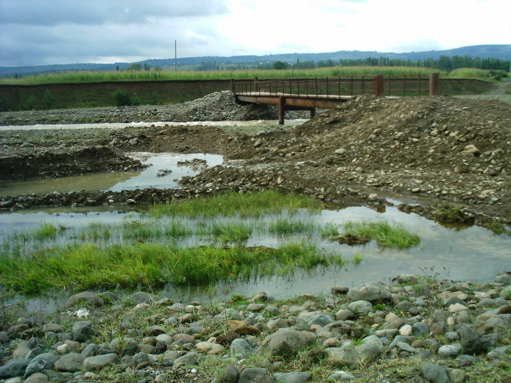 Sachkhere (Georgia) September 2003 (auf Deutsch; in German) en español: Arroyo near Sachkhere.